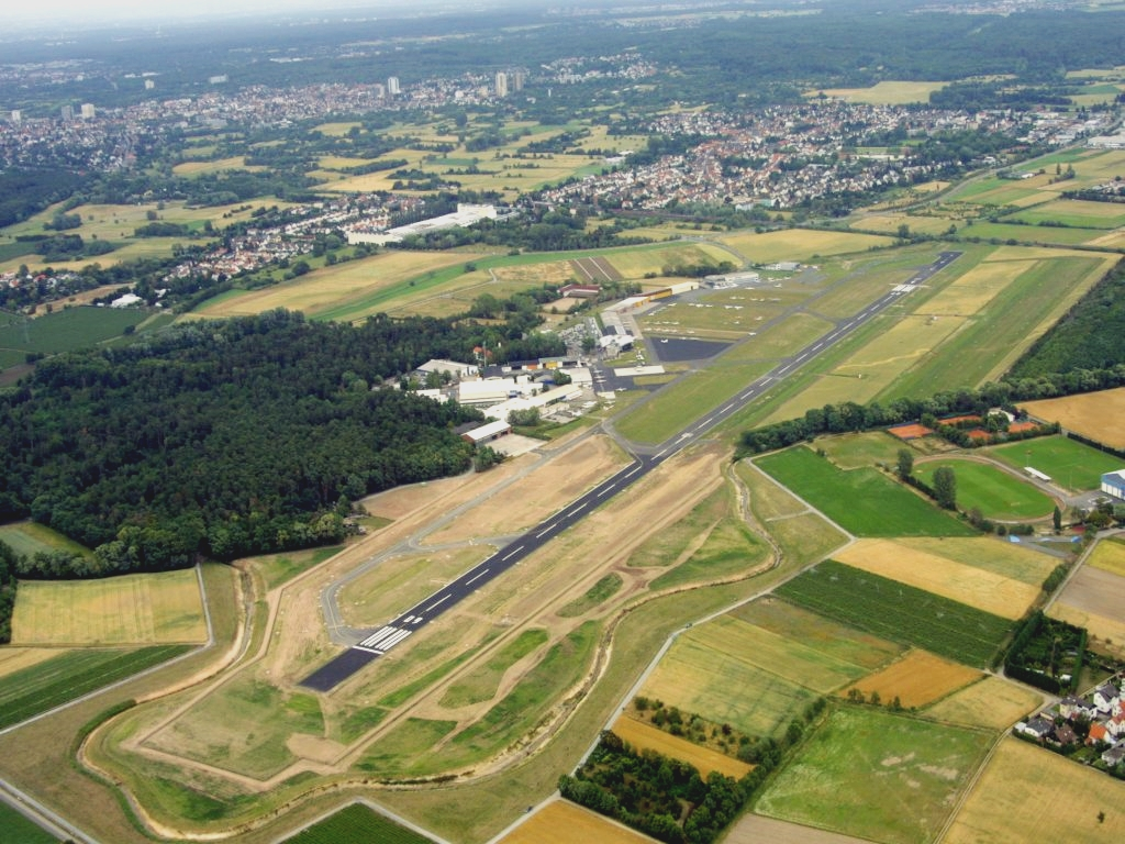 Luftaufnahme Flugplatz Frankfurt-Egelsbach; dahinter Egelsbach, im Vordergrund der wegen der verlängerten Bahnen des Flugplatzes künstlich umgeleitete Bachlauf des Hegbachs